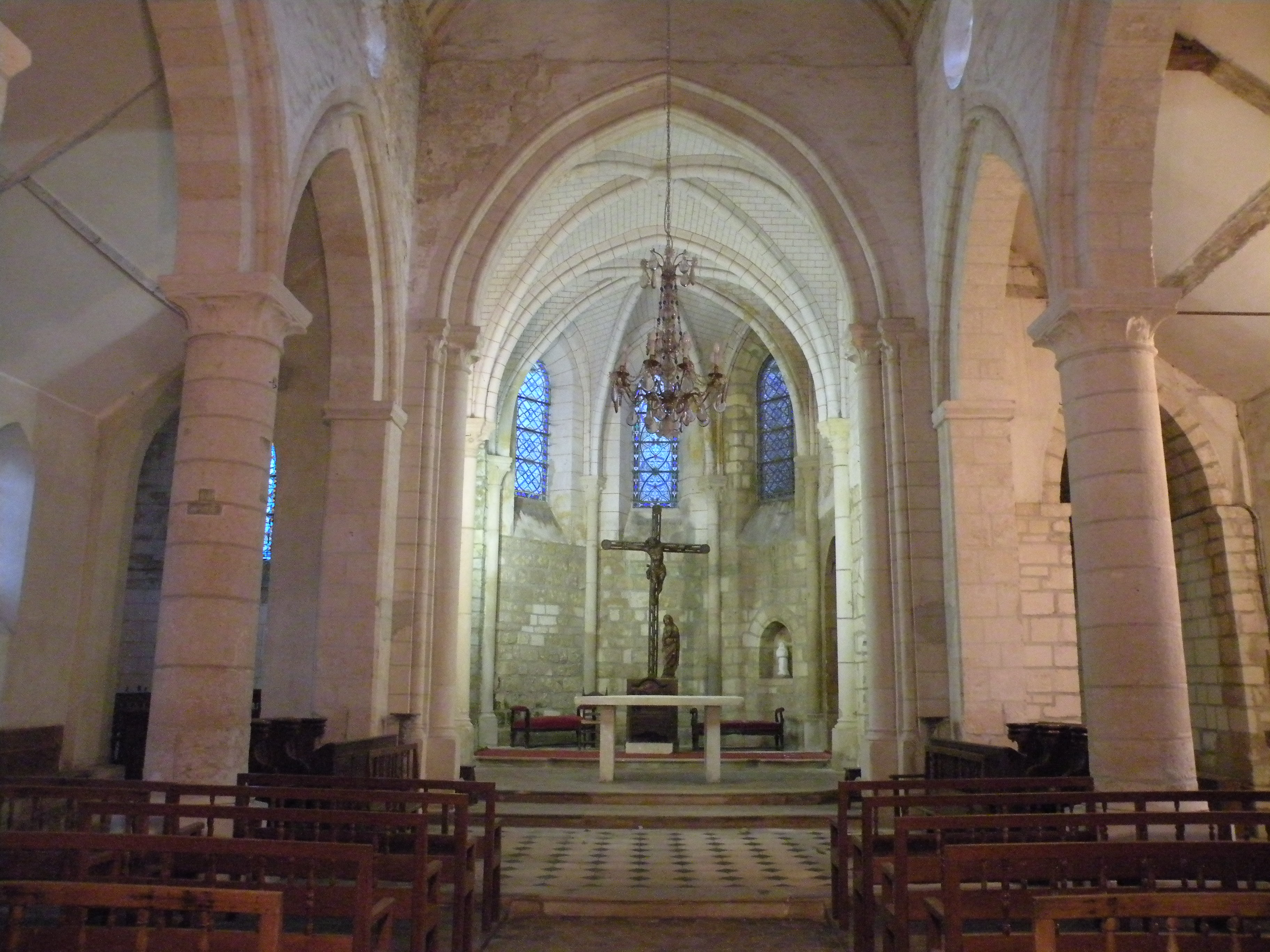 église Saint-Martin de Frouville